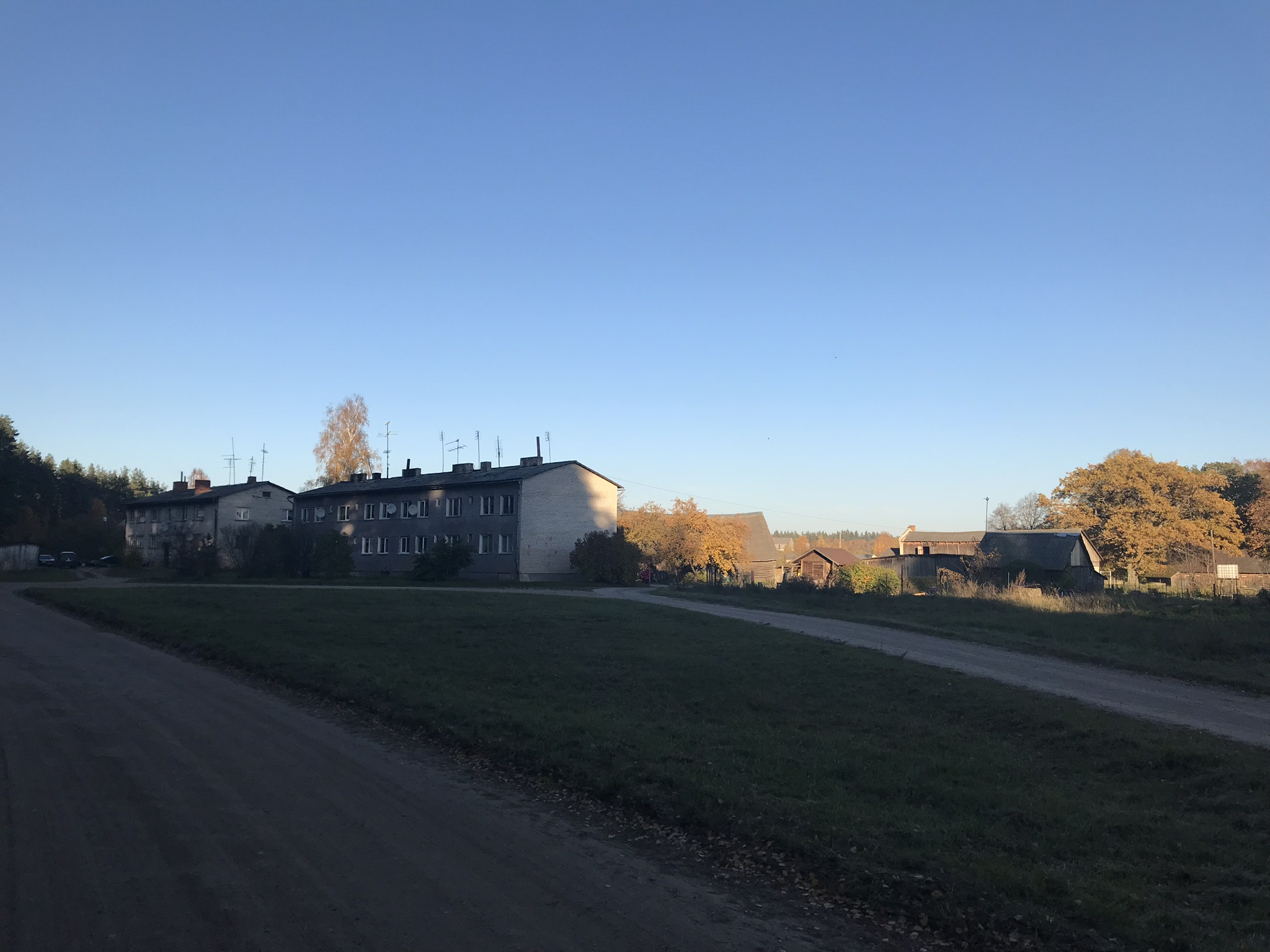 Skats uz padomju laika apbūvi Pieškalnu ciemā no vietējās nozīmes valsts autoceļa V292.